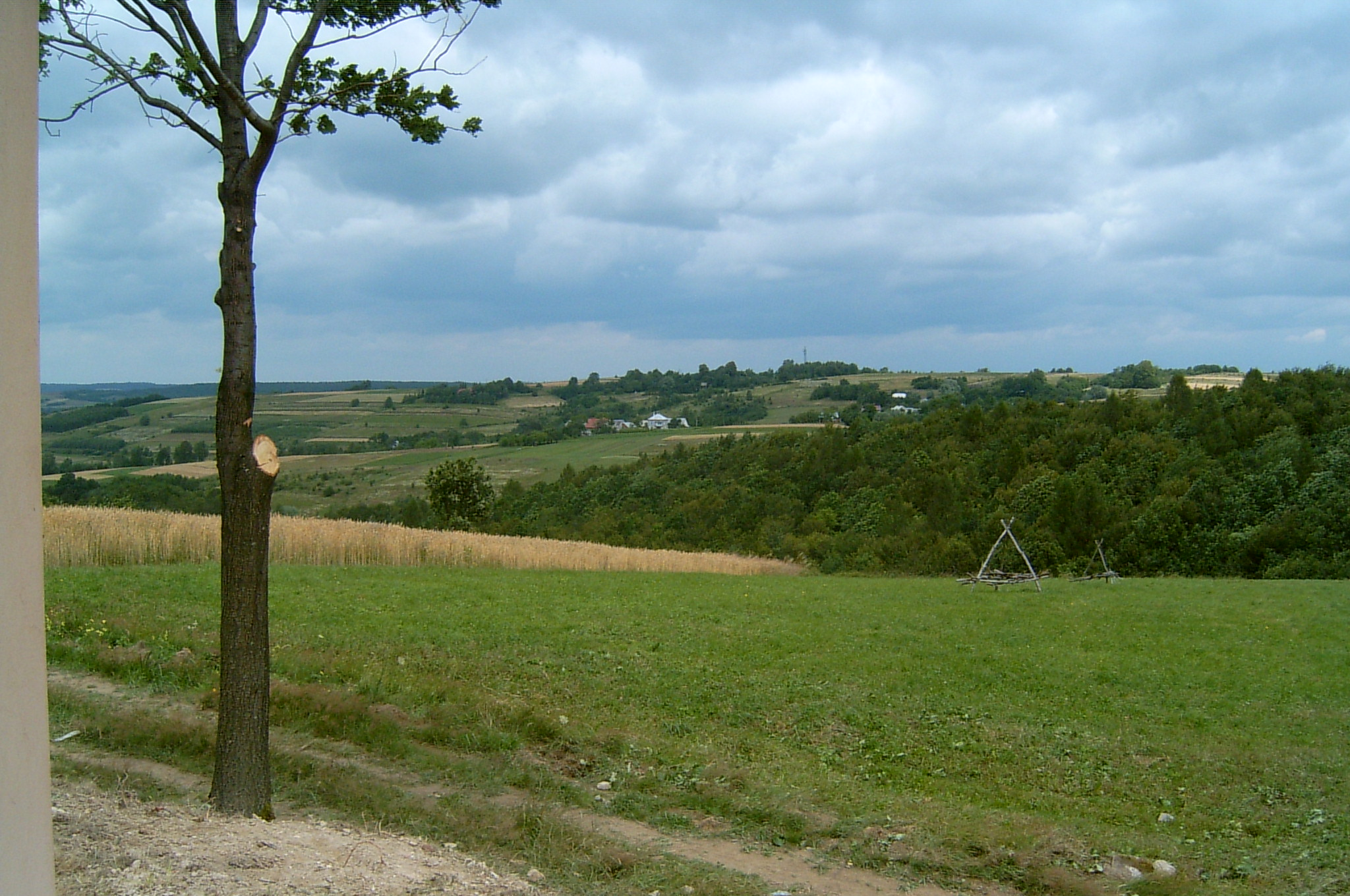 Hucisko Jawornickie, Poland